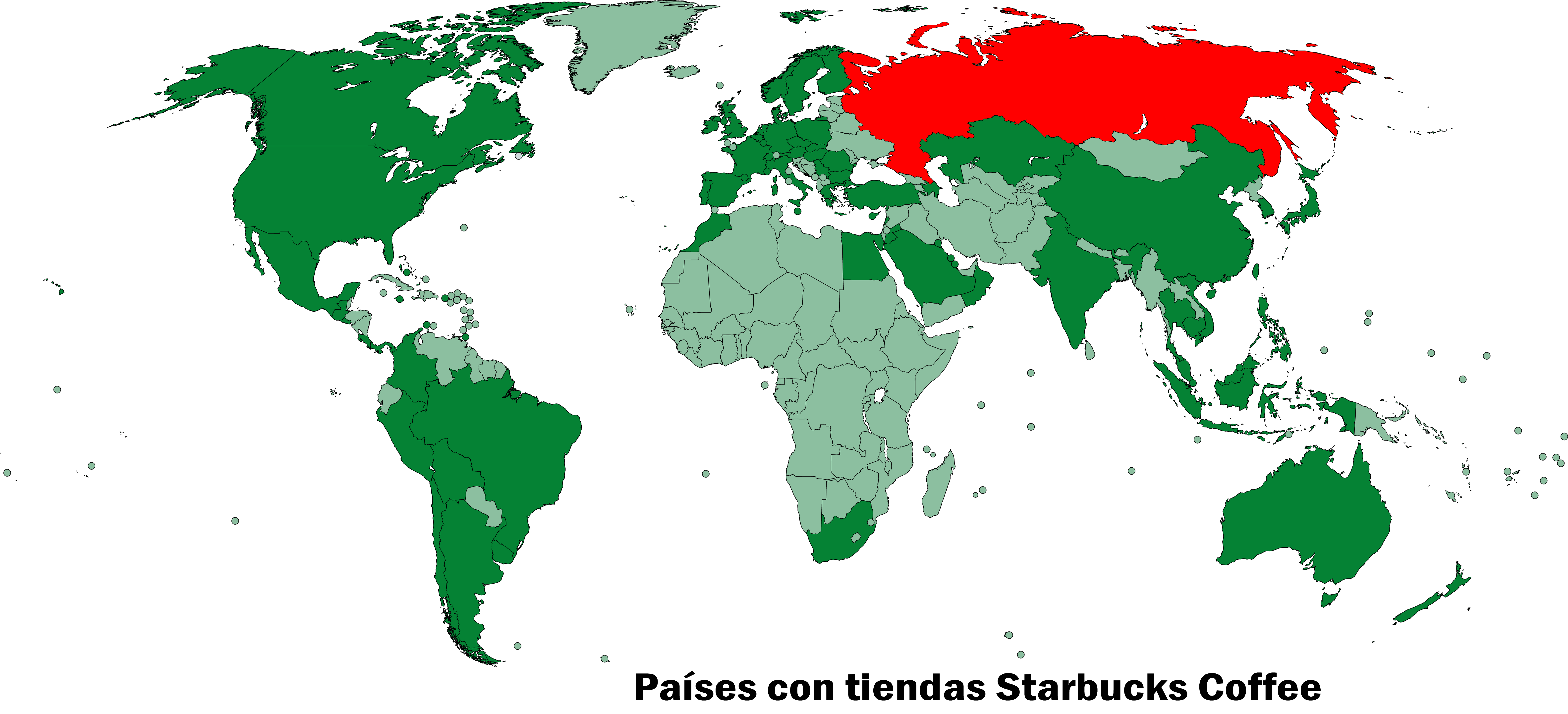 Mapa que muestra los países y territorios con Starbucks Coffee.